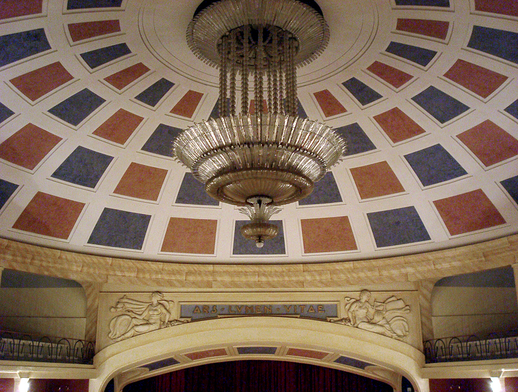 Il lampadario della sala del Teatro Verdi di San Severo, opera della ditta Venini di Murano su disegno di Cesare Bazzani.